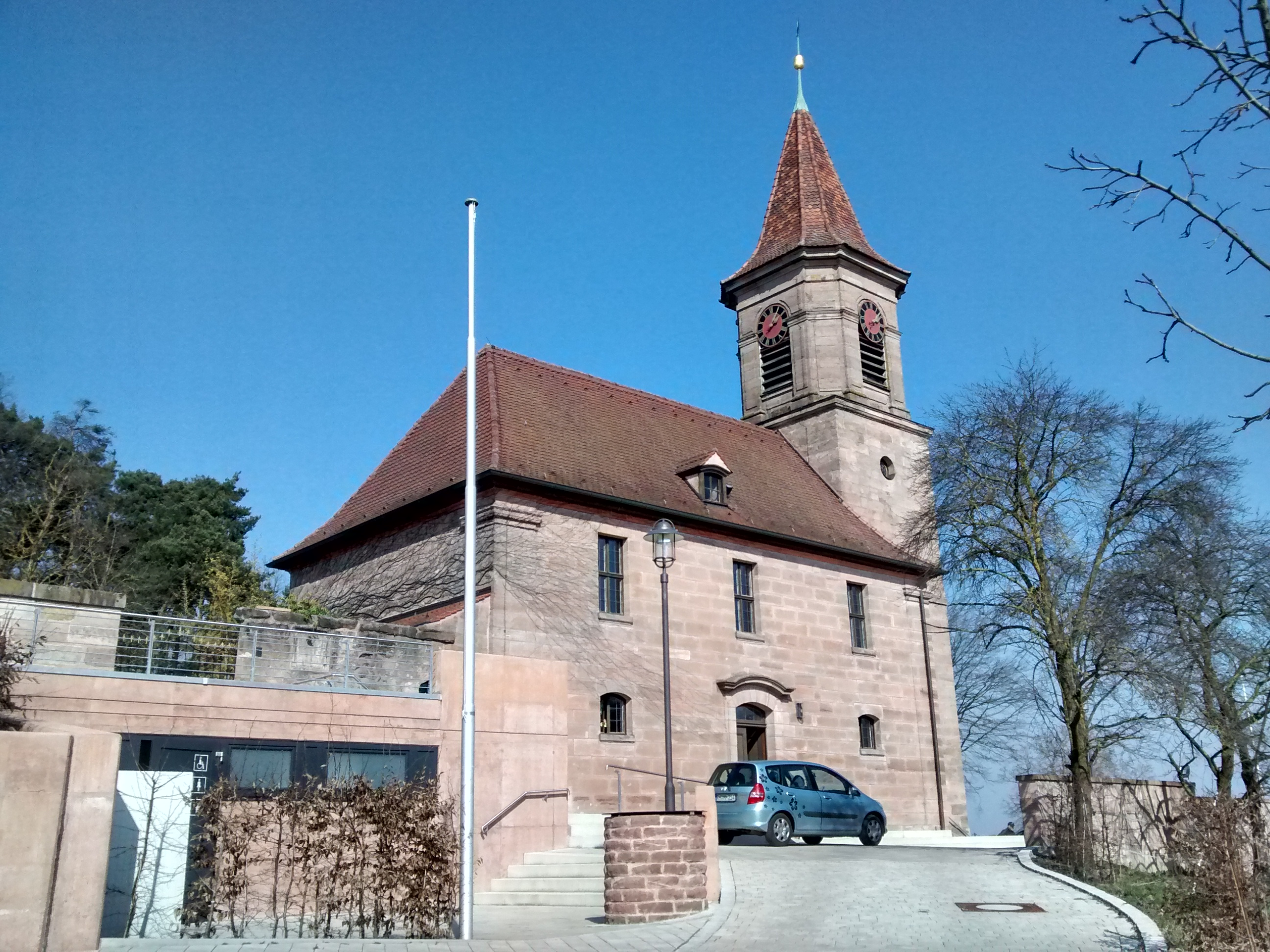 Georgskirche Kammerstein